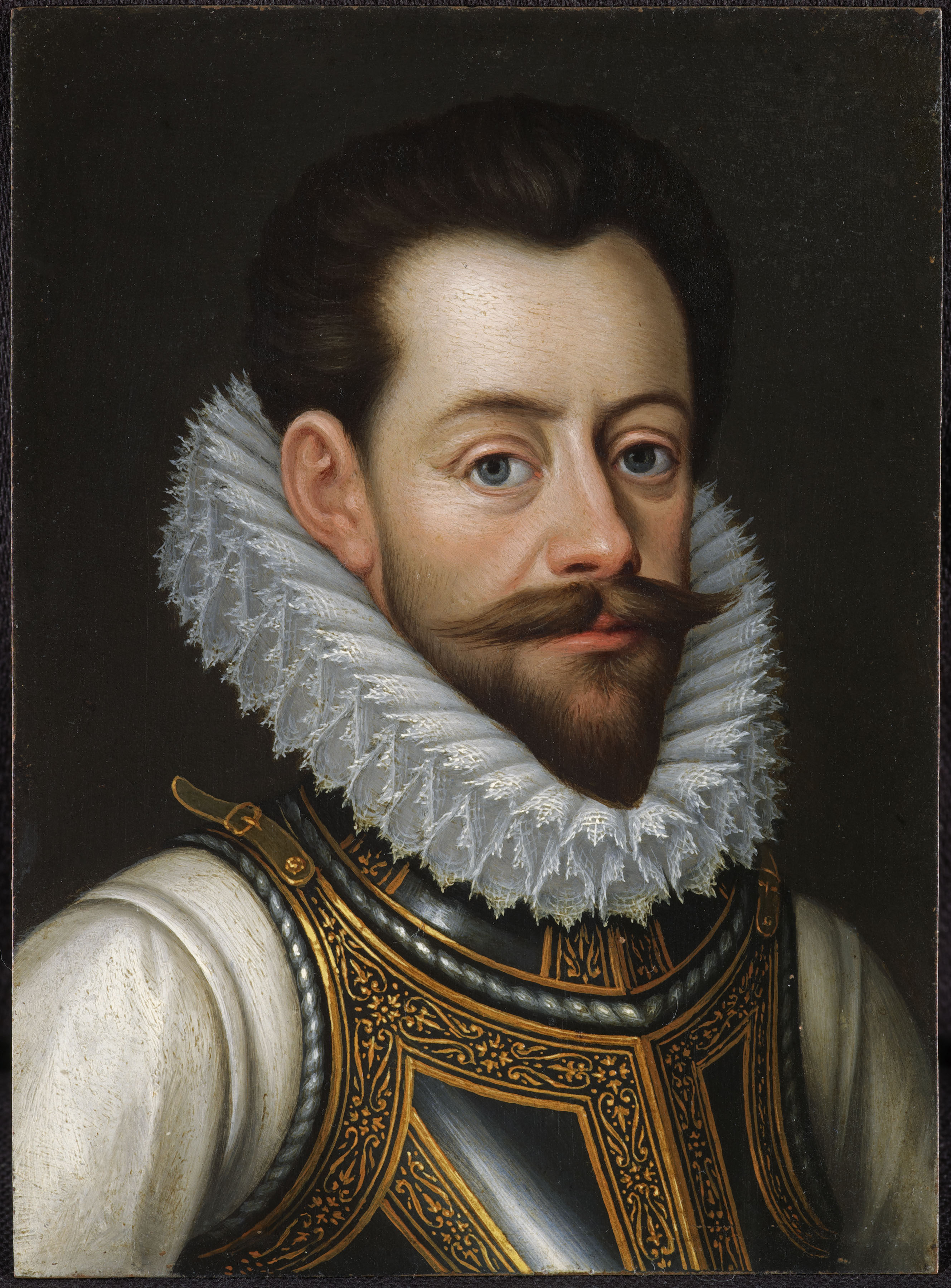 Miniatura Alessandro Farnese cm. 9,8 x 7,3. Opera di Jean de Saive (Namur 1540 - 1611)